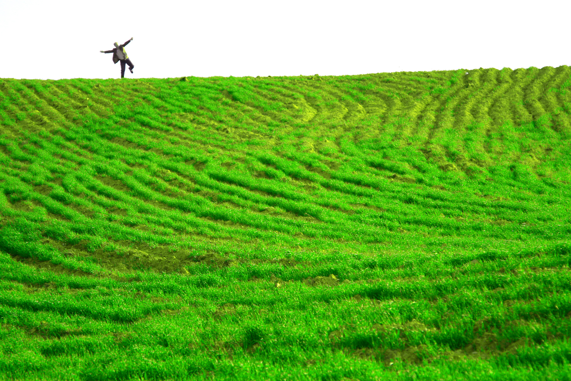 Karaj - ajindojin